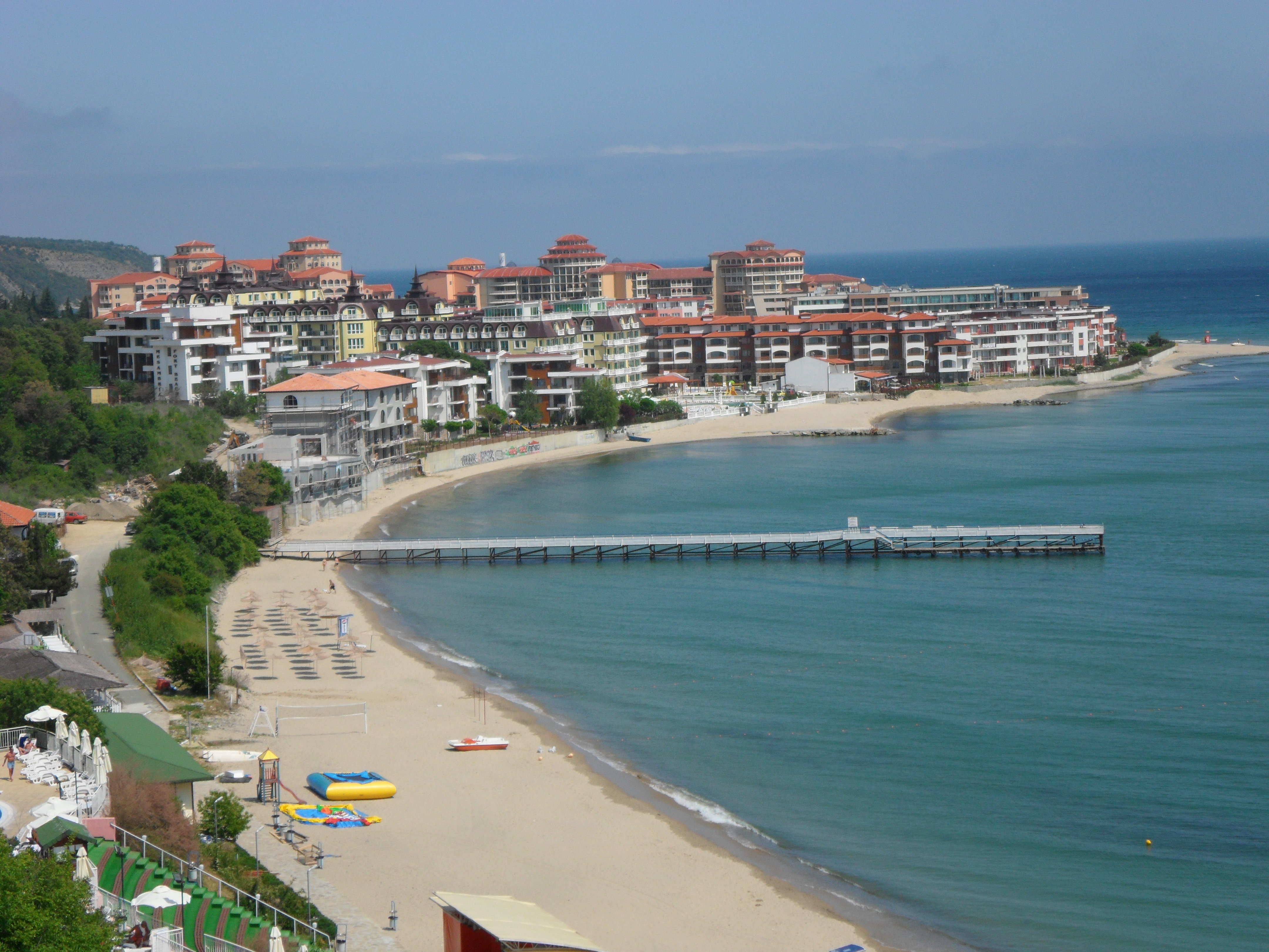 Плажът на Свети Влас (изглед от хотел "Парадайз бийч"